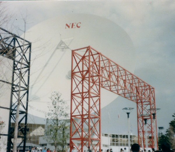 科学万博